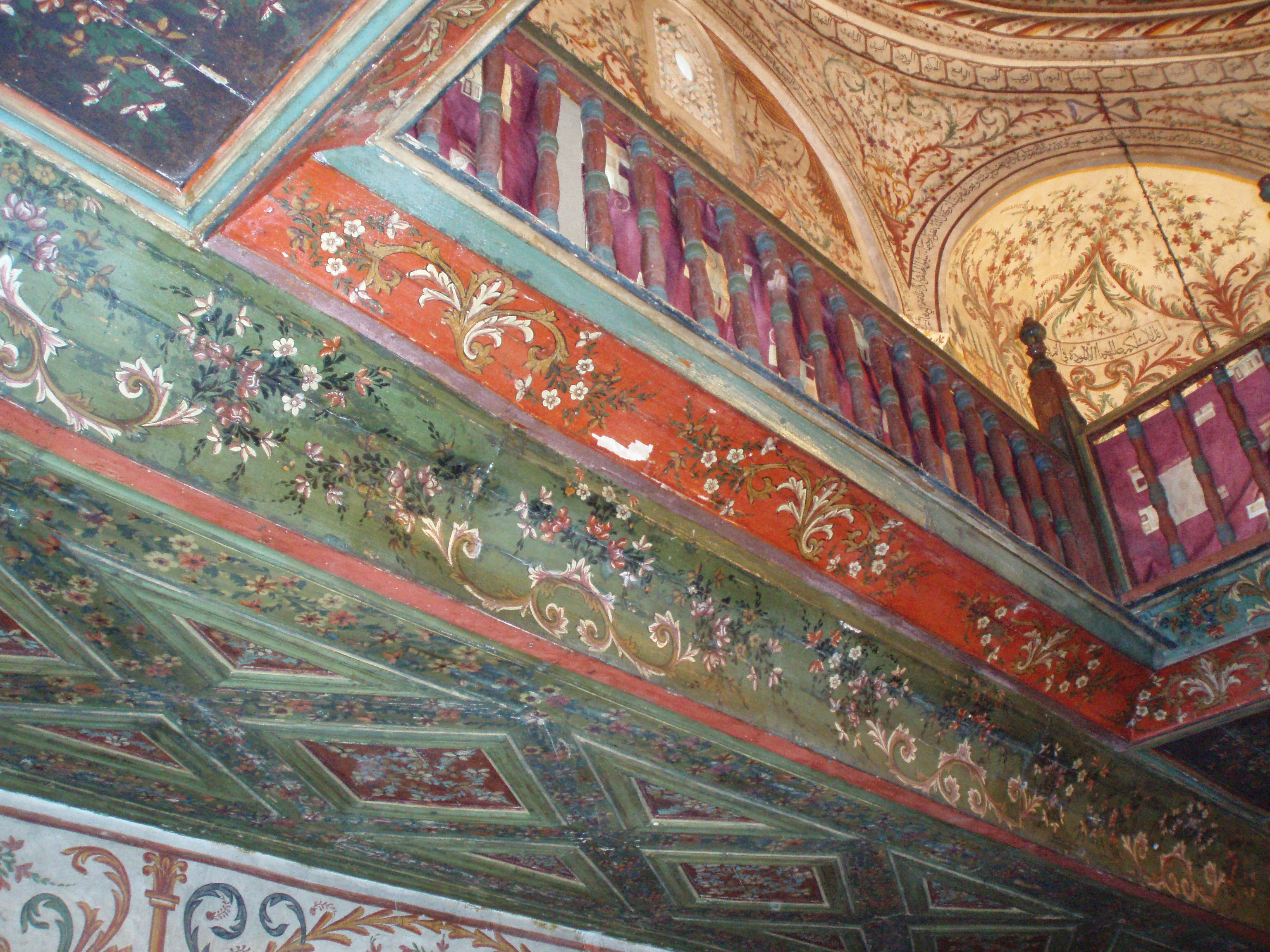 Tirana. Et'hem Bey Mosque.